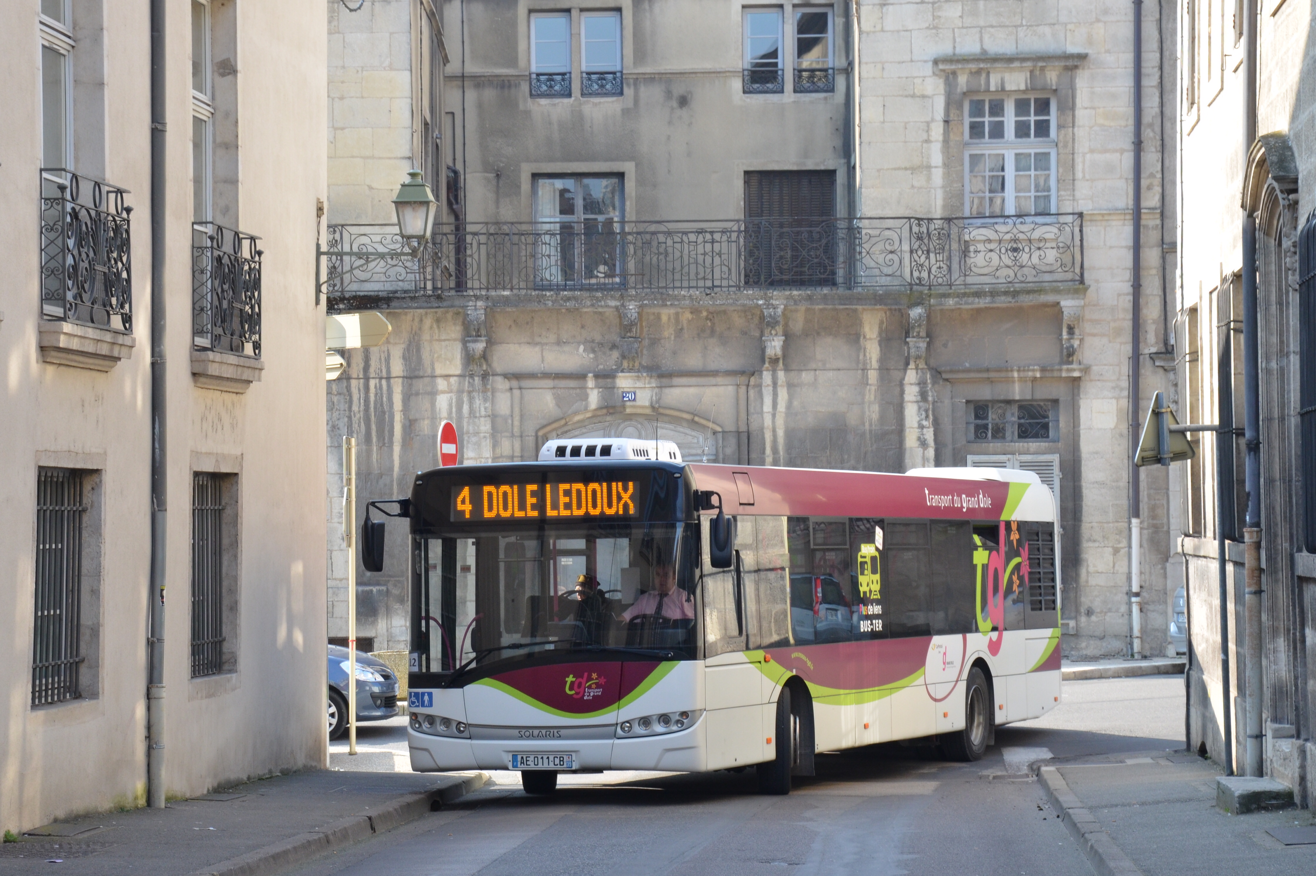 Solaris Urbino 12 n°12 de la ligne 4 du réseau TGD de Dole, près de l'arrêt Boyvin.